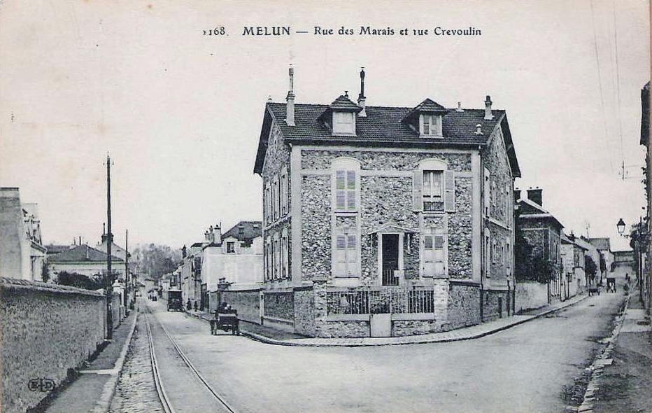 Rails du tramway de Verneuil, à l'intersection entre la rue Crevoulin et de la rue des Marais.